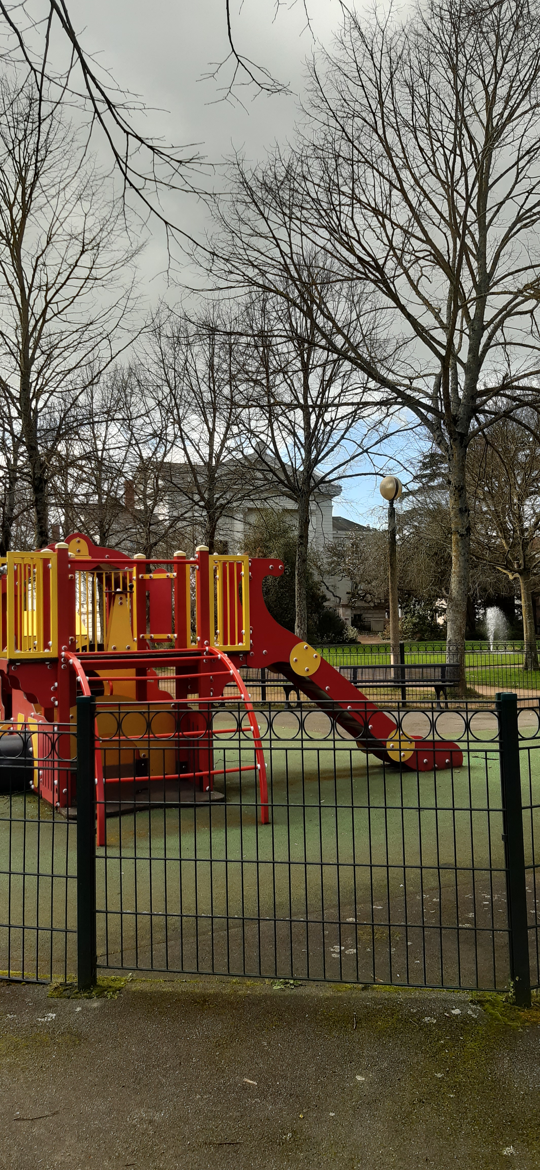 vu de la structure récréative du Jardin du Mail de Cholet le 13 mars 2020